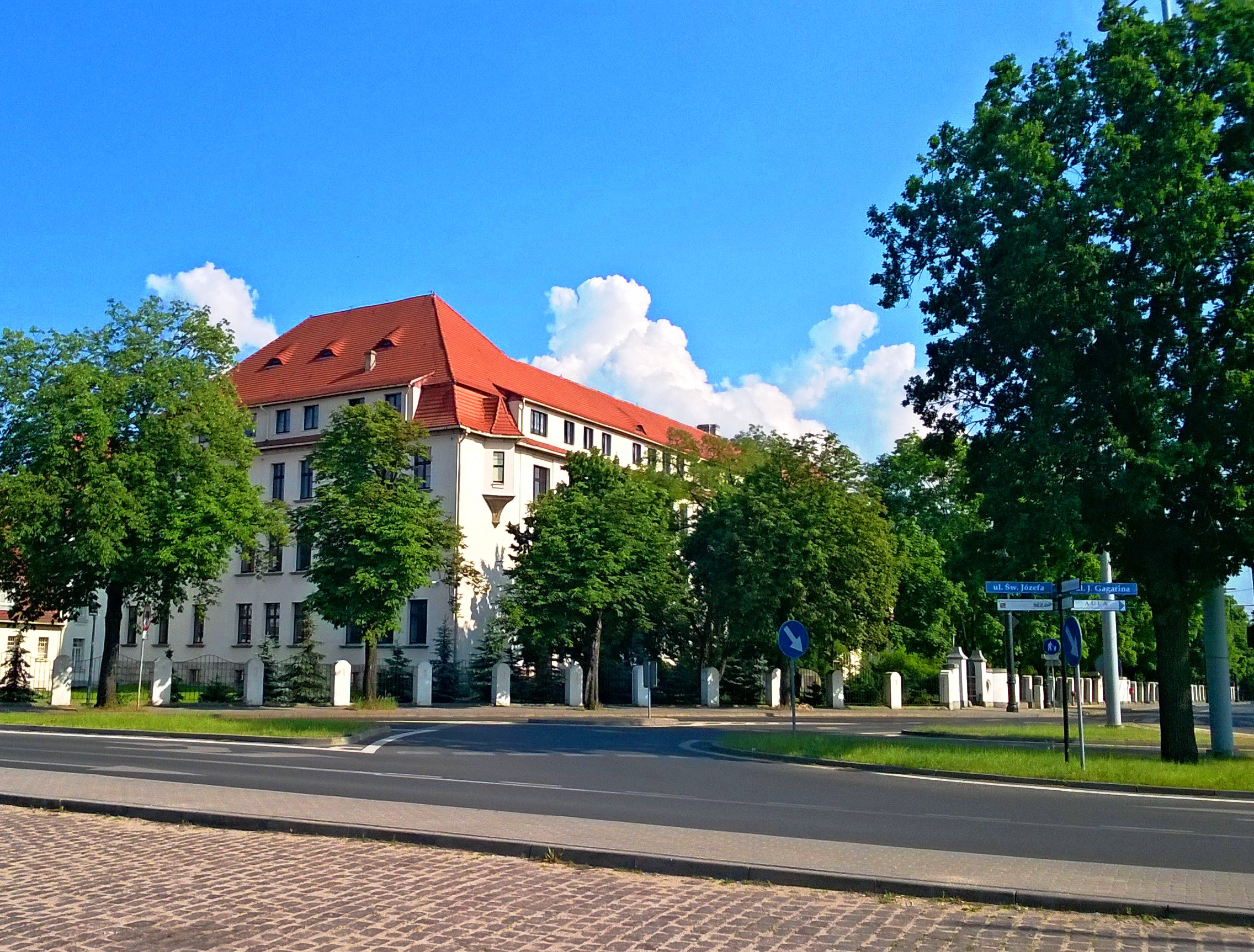 Plac ks. S. Frelichowskiego w Toruniu